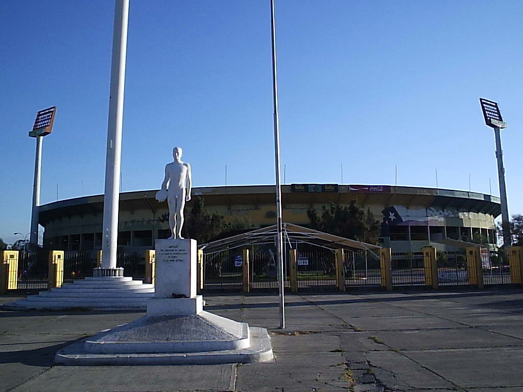 Estadio Nacional de Chile (entrada Grecia) Autor:Alstradiaan Fecha:Enero de 2005 Fotografía tomada con una cámara digital Olympus camedia D-395 de 3.2 megapixeles Categoría:Chile (imagen)